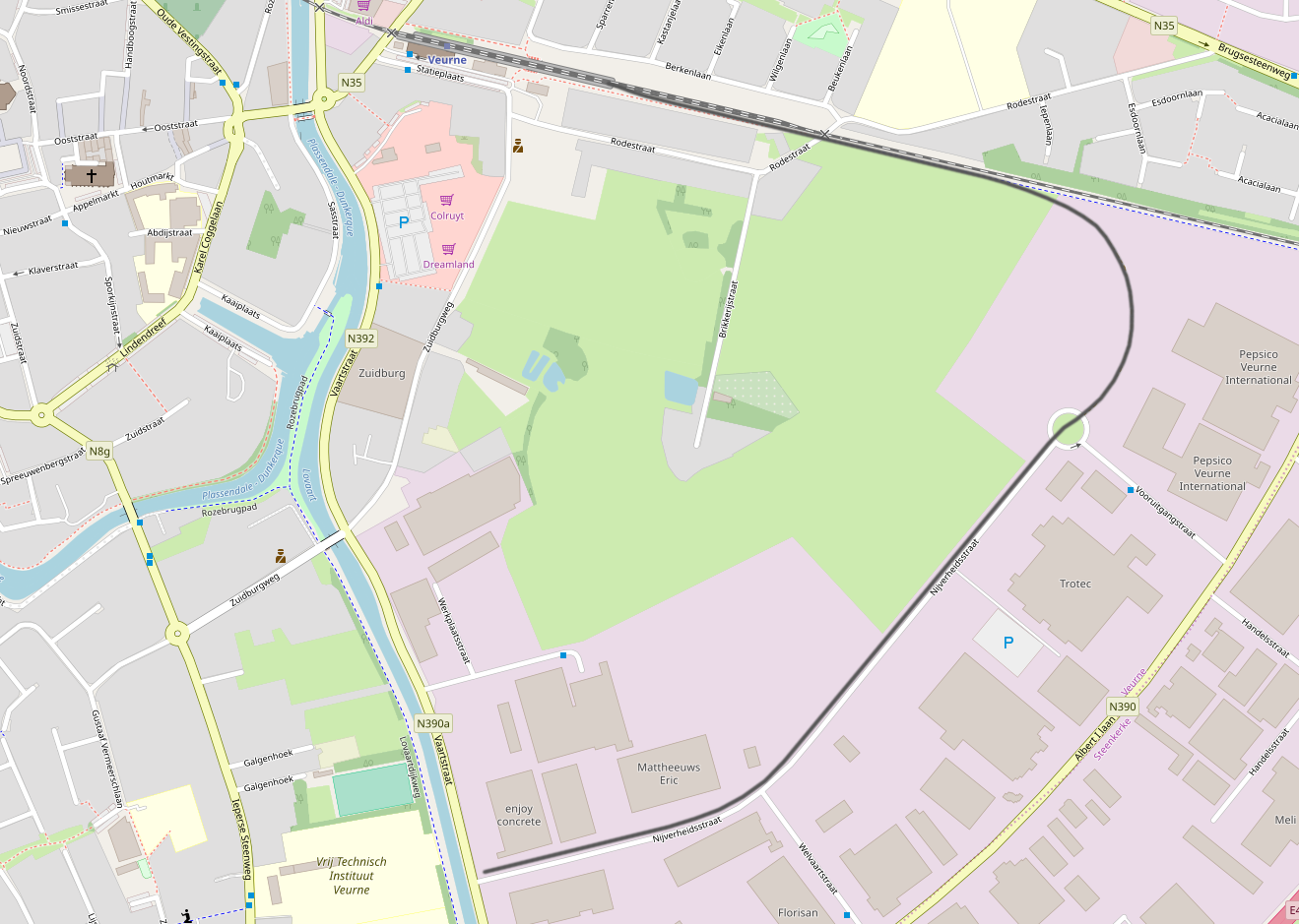 Belgian Railway Line 275, Veurne - Lovaart